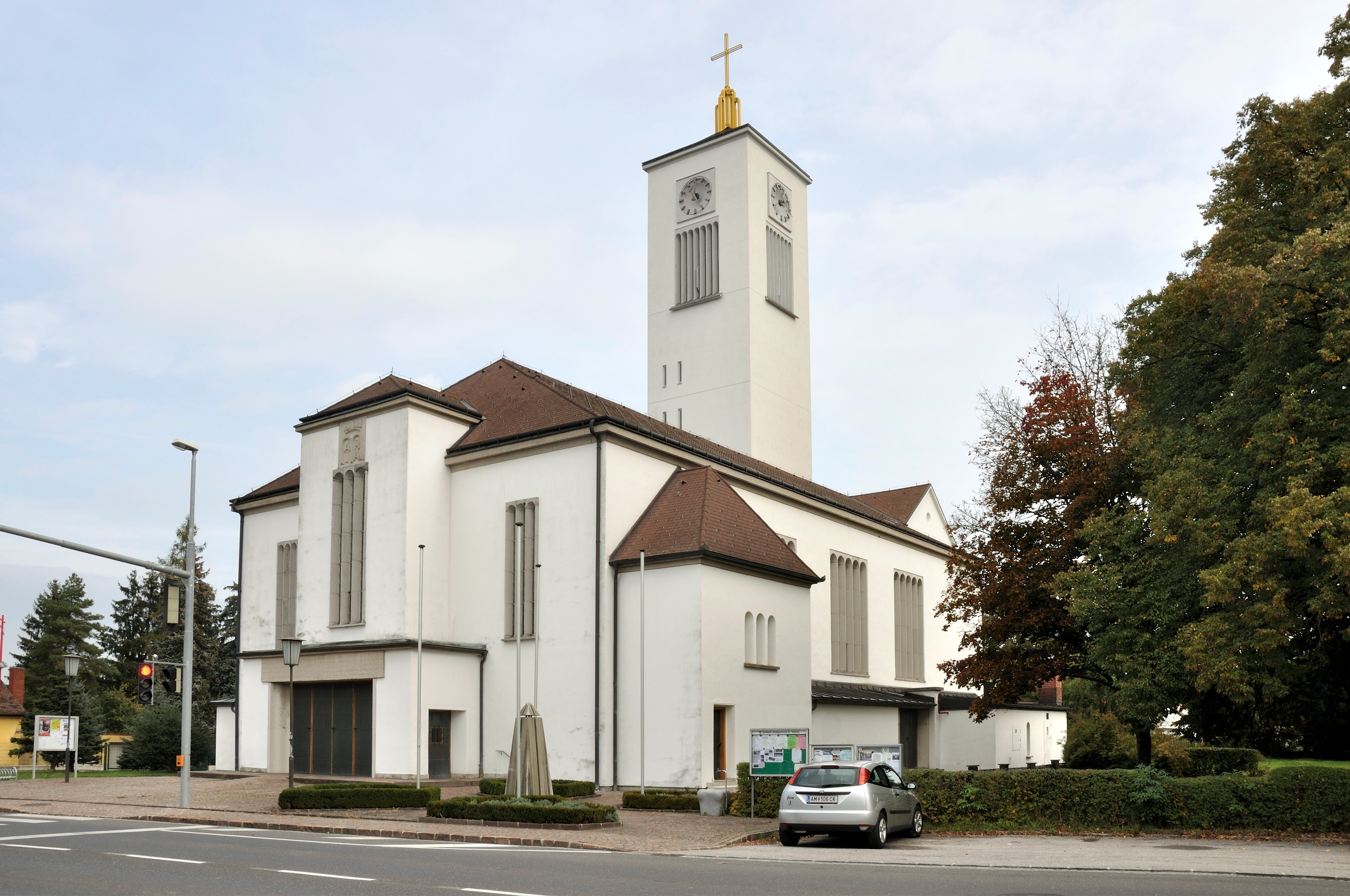 Kath. Pfarrkirche hl. Maria von der immerwährenden Hilfe